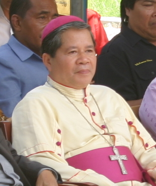 Uskup Agung Samarinda, Mgr. Florentinus Sului Hajang Hau, MSF